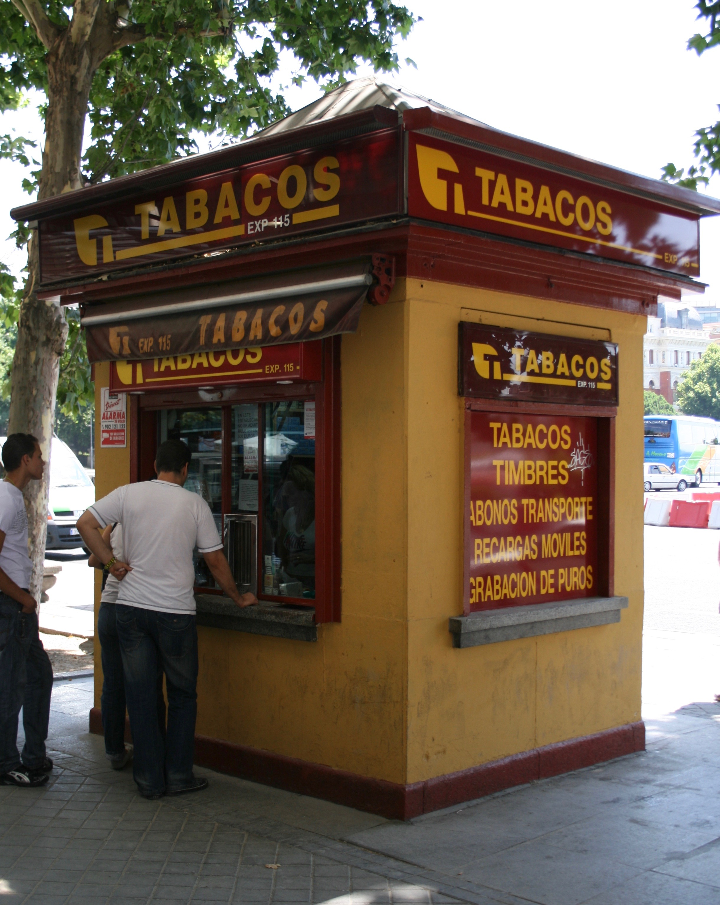 Tabacalera - España